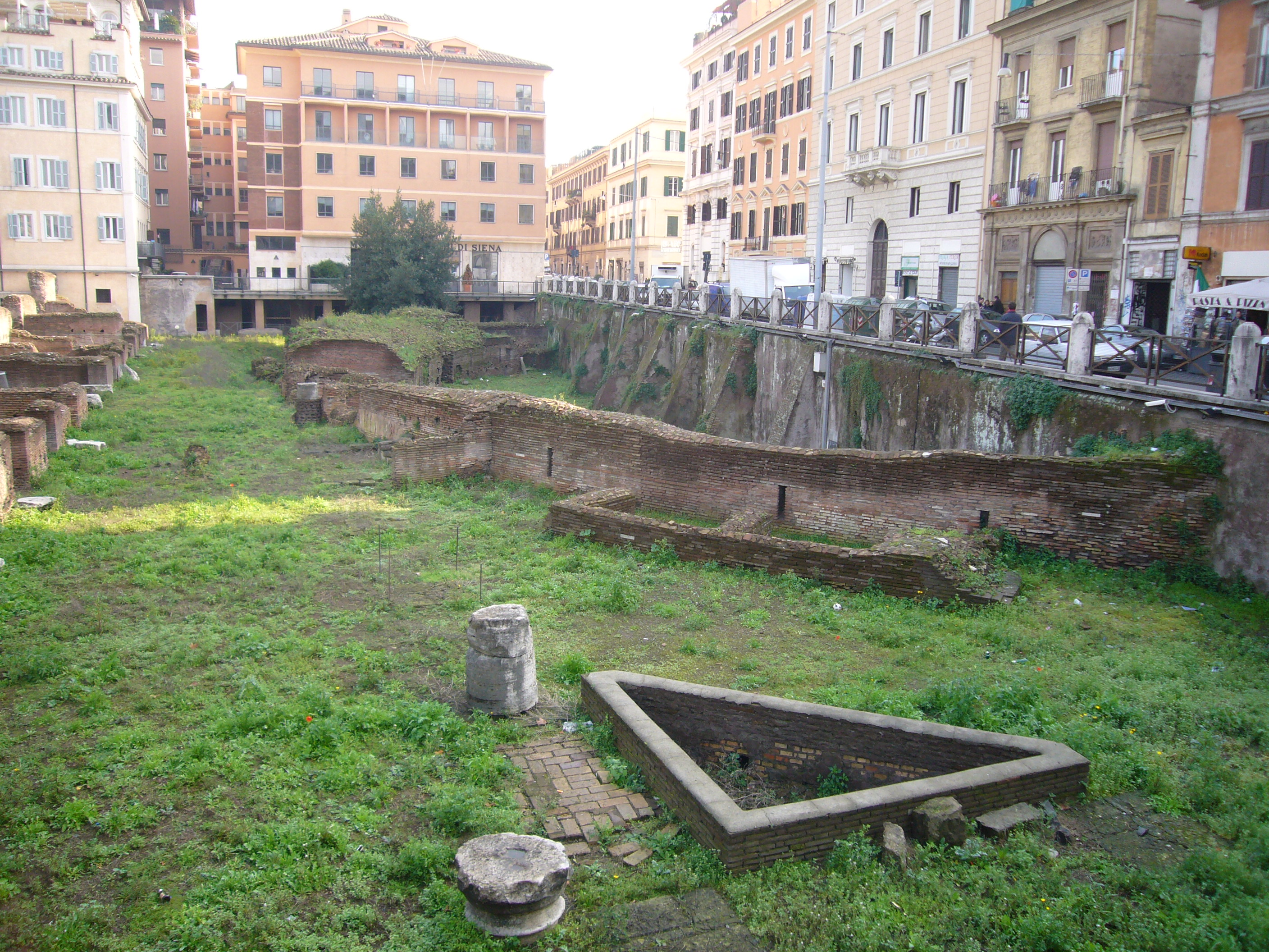 Roma, Ludus Magnus: la curva dell'arena; a sinistra i resti degli alloggi dei gladiatori; lo spazio triangolare in primo piano era una fontana